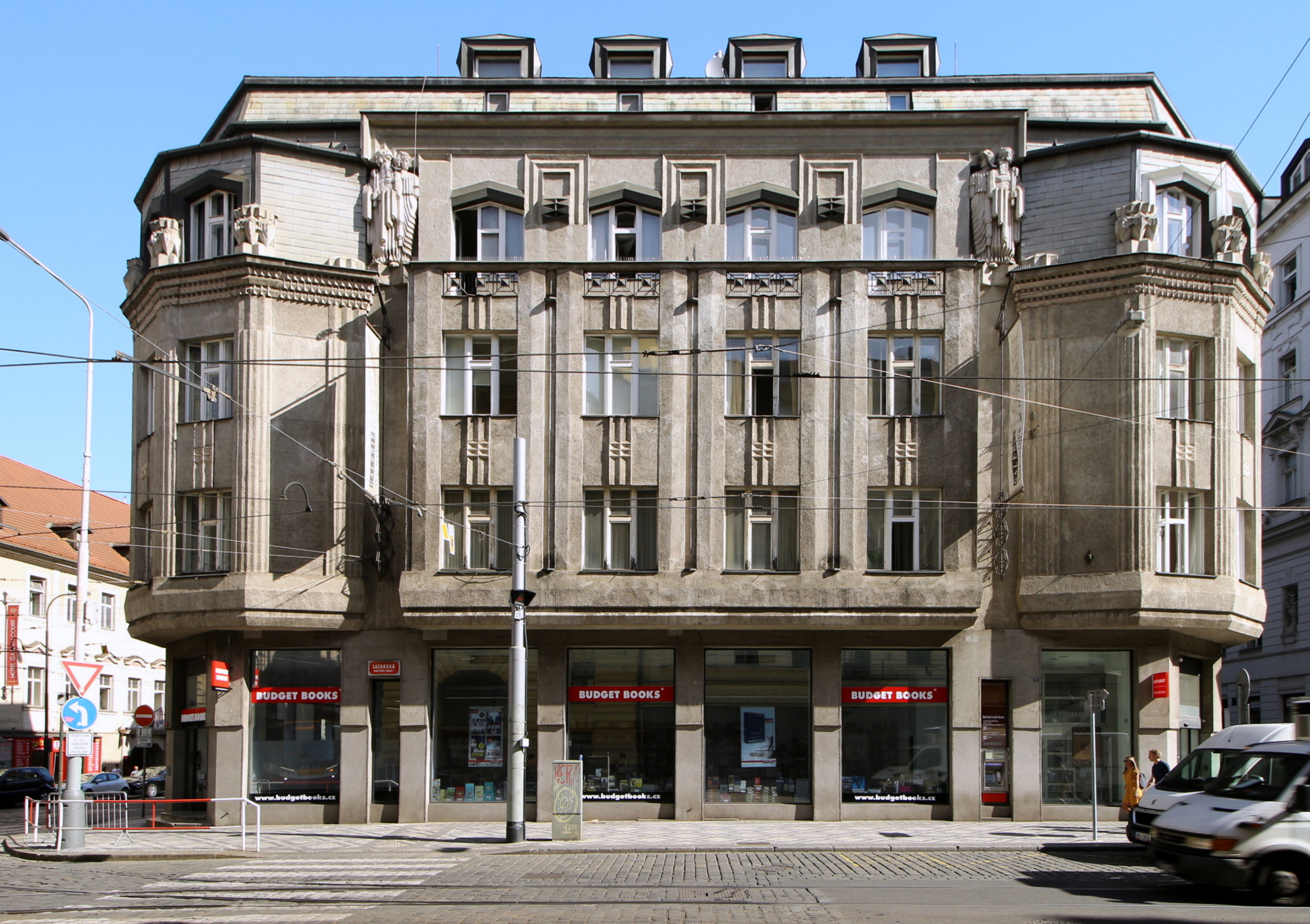 Palác Diamant na rohu ulic Spálená a Lazarská